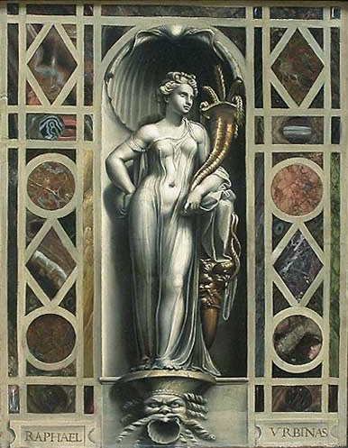 Ateliê de Rafael (atribuído a Giulio Romano). Céres, ou Abundância. Óleo sobre madeira, 38 x 31 cm. Acervo do Museu do Louvre, Paris. INV 657